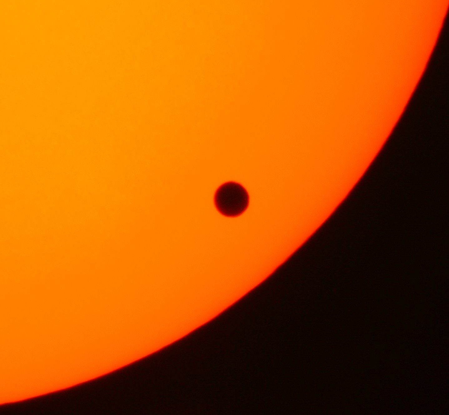 Venustransit am 08.06.2004 um 12:33 - Venus nähert sich dem östlichen Rand der Sonnenscheibe Aufnahmemodalitäten: Standort: Jena (Thüringen), 50°57'36.1" N, 11°36'58.2" O Kamera: Digitalkamera Medion MD 41066 5,18 Megapixel (2560x1920), 3-fach Zoom eingestellt (entspricht Brennweite 111 mm), Blende 4,9 Teleskop: Schulfernrohr der DDR (Telementor), Objektivdurchmesser 63 mm, Objektivbrennweite 840 mm, Okularbrennweite 16 mm, somit Vergrößerung 52,5 x, Objektivsonnenfilter Belichtungszeit: 1/45 s